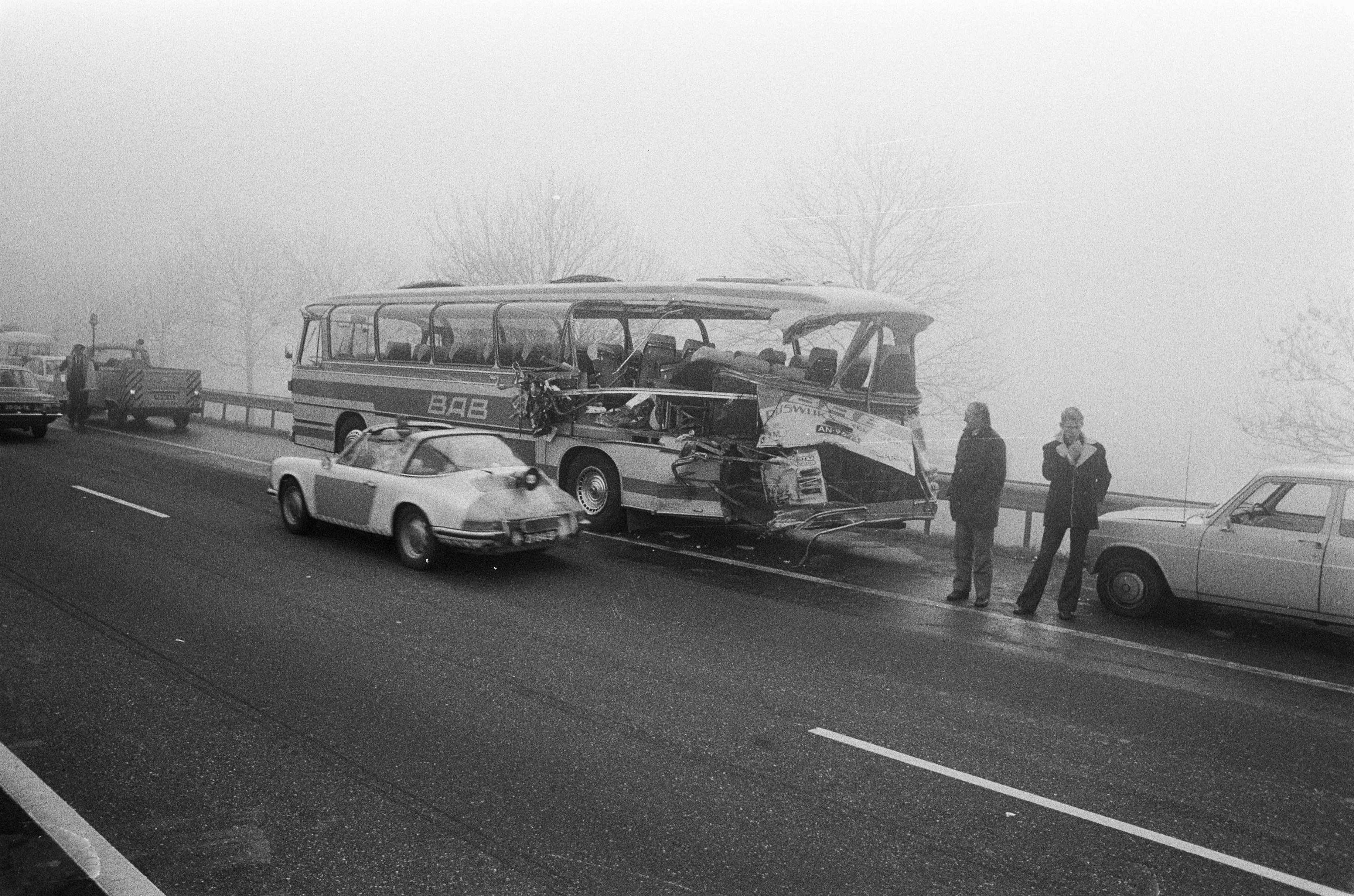 Collectie / Archief : Fotocollectie Anefo Reportage / Serie : Autobotsingen op de weg Utrecht -Den Haag (A12) in de mist Beschrijving : Zwaar beschadigde bus op de vluchtstrook Datum : 22 november 1973 Locatie : Zuid-Holland Trefwoorden : autobotsingen, bussen, mist, wrakken Fotograaf : Fotograaf Onbekend / Anefo Auteursrechthebbende : Nationaal Archief Materiaalsoort : Negatief (zwart/wit) Nummer archiefinventaris : bekijk toegang 2.24.01.05 Bestanddeelnummer : 926-8453